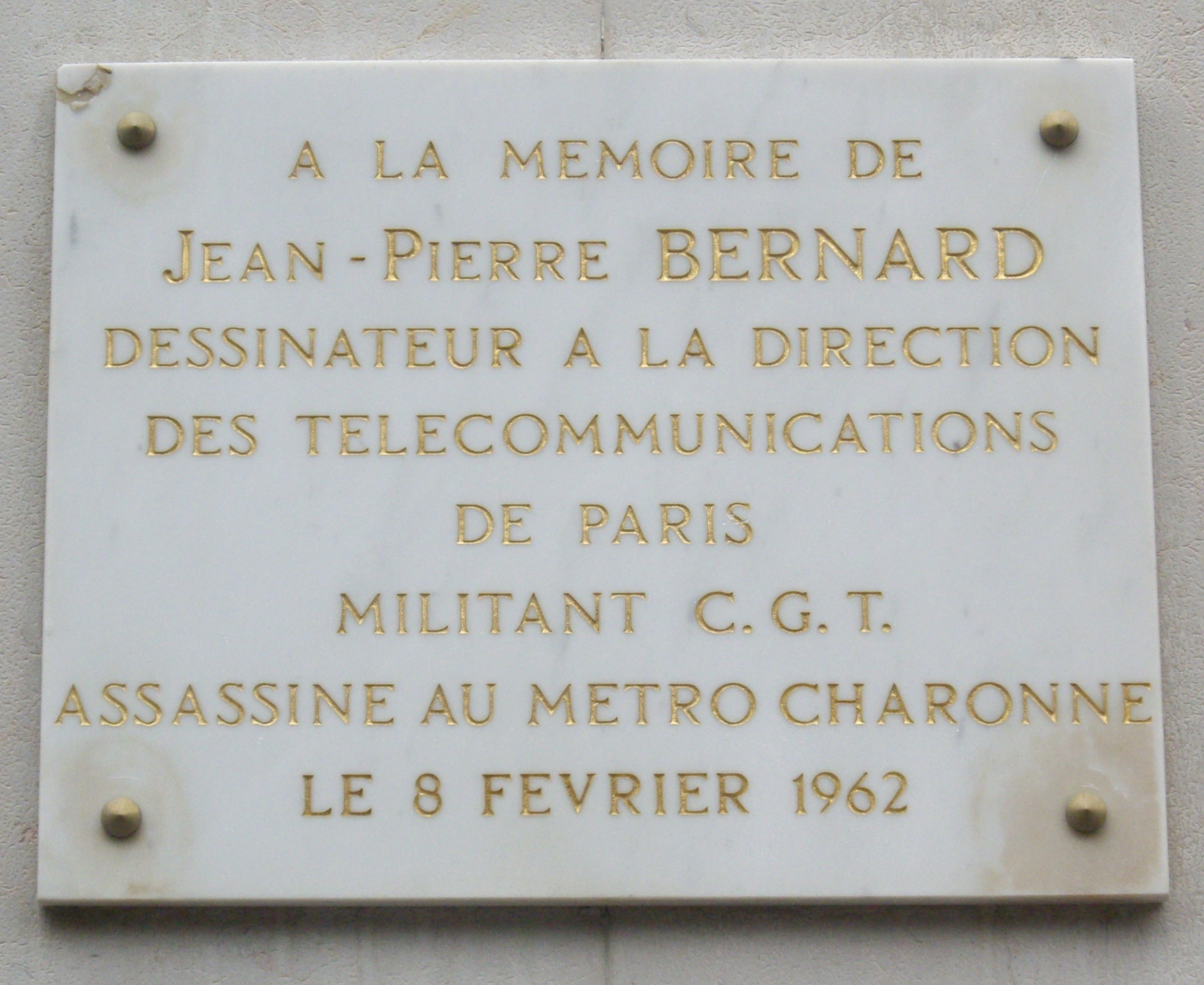 Plaque apposée sur la façade de la Direction des Télécommunications d'Île-de-France au n° 18 du boulevard de Vaugirard, Paris 15e. « À la mémoire de Jean-Pierre Bernard, dessinateur à la Direction des Télécommunications de Paris, militant CGT, assassiné au métro Charonne le 8 février 1962. »